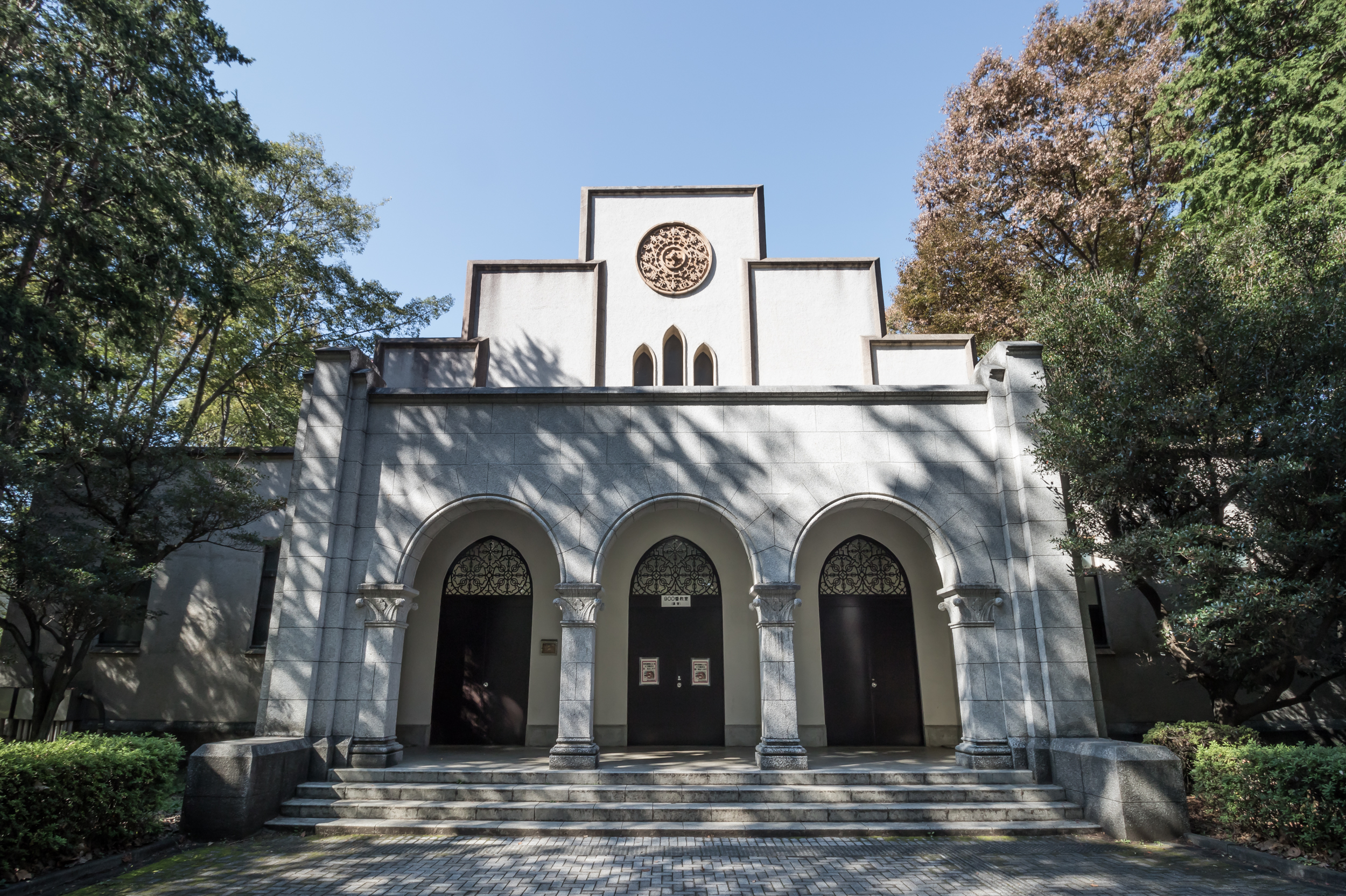 東京大学駒場キャンパス、900番教室（講堂）。旧制第一高等学校図書館、内田祥三設計 (1935)